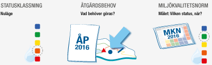 Illustration over förhållandet mellan statusklassning av vattenförekomster (vatten som är minst 1 kvadratkilometer i storlek) och normen